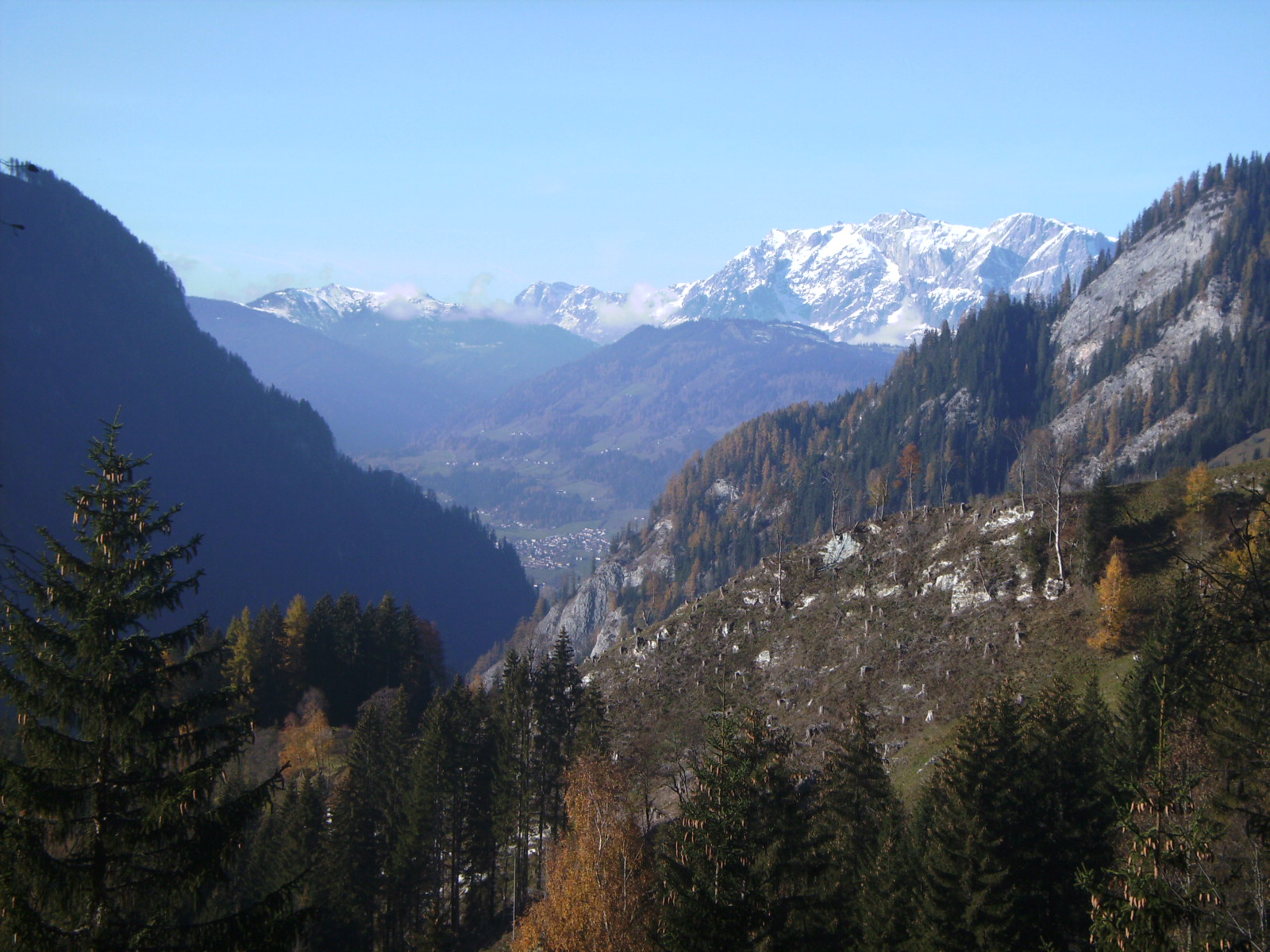 Blick Richtung Norden zum Hochkönig